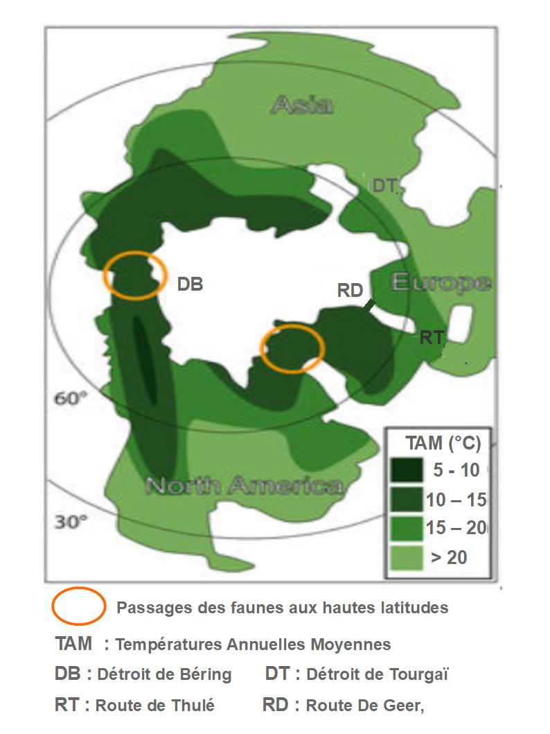 La Grande Coupure a un impact important sur la faune et la flore. Elle est à l'origine de l'apparition de nouvelles lignées et de migrations continentales d'espèces qui empruntent plusieurs routes.